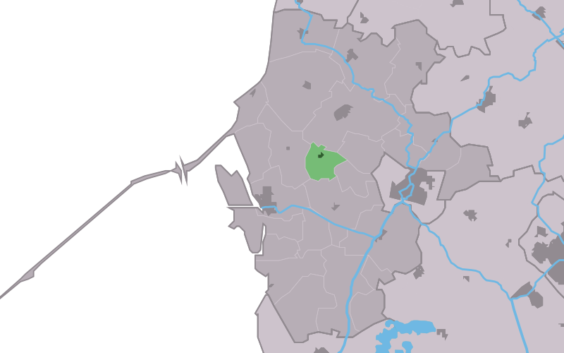 Kaartsje fan himrik fan Skraard